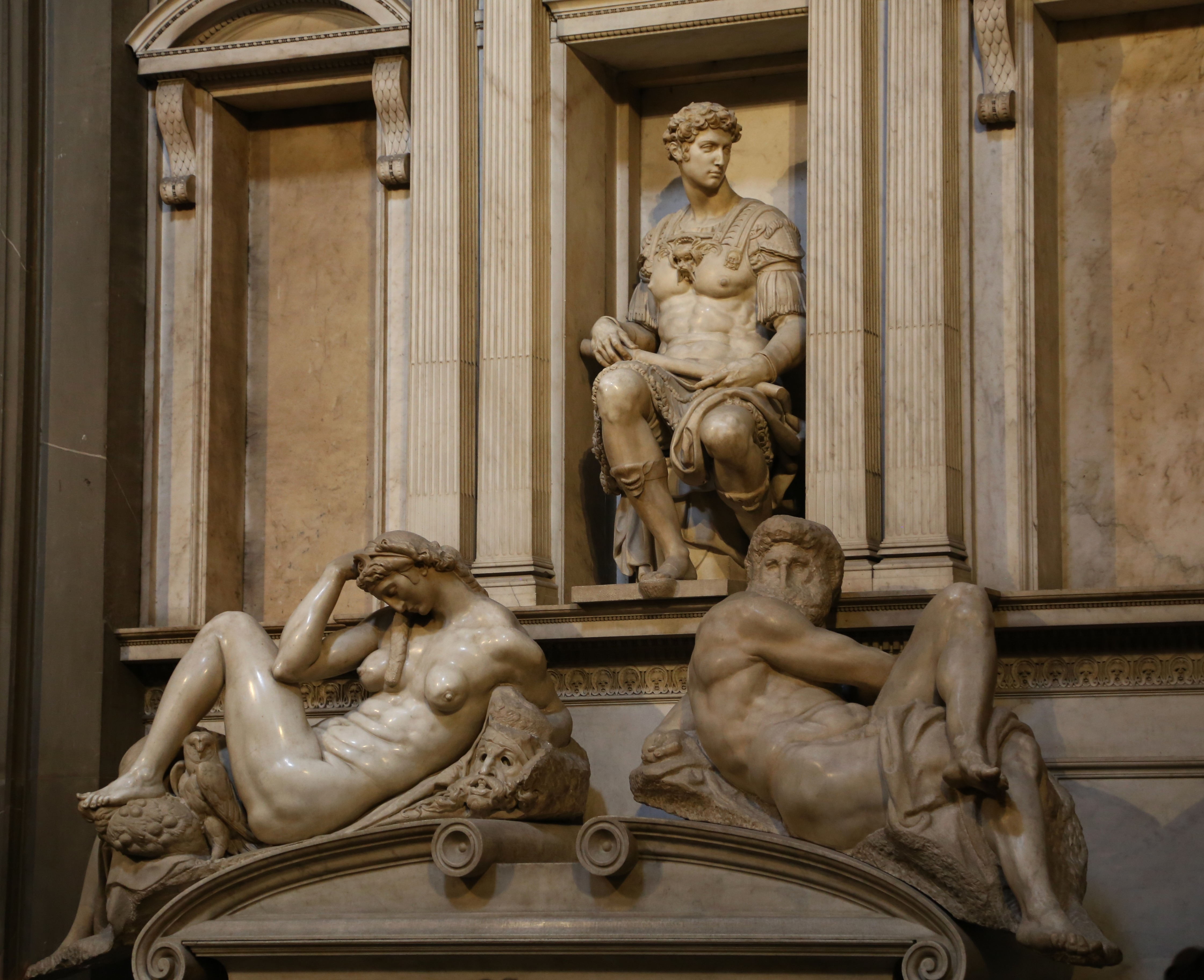 Medici-Kapelle, Florenz Grabmal von Giuliano II. de Medici (Michelangelo)